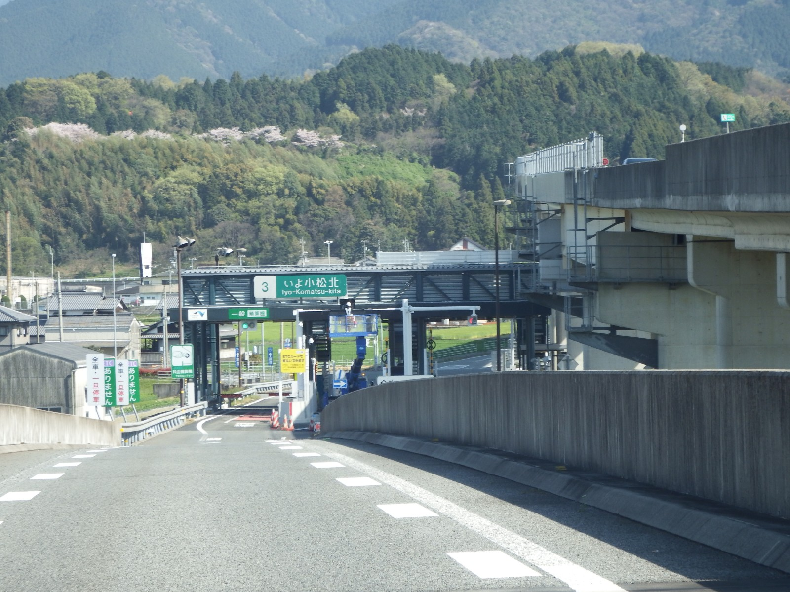 いよ小松北インター